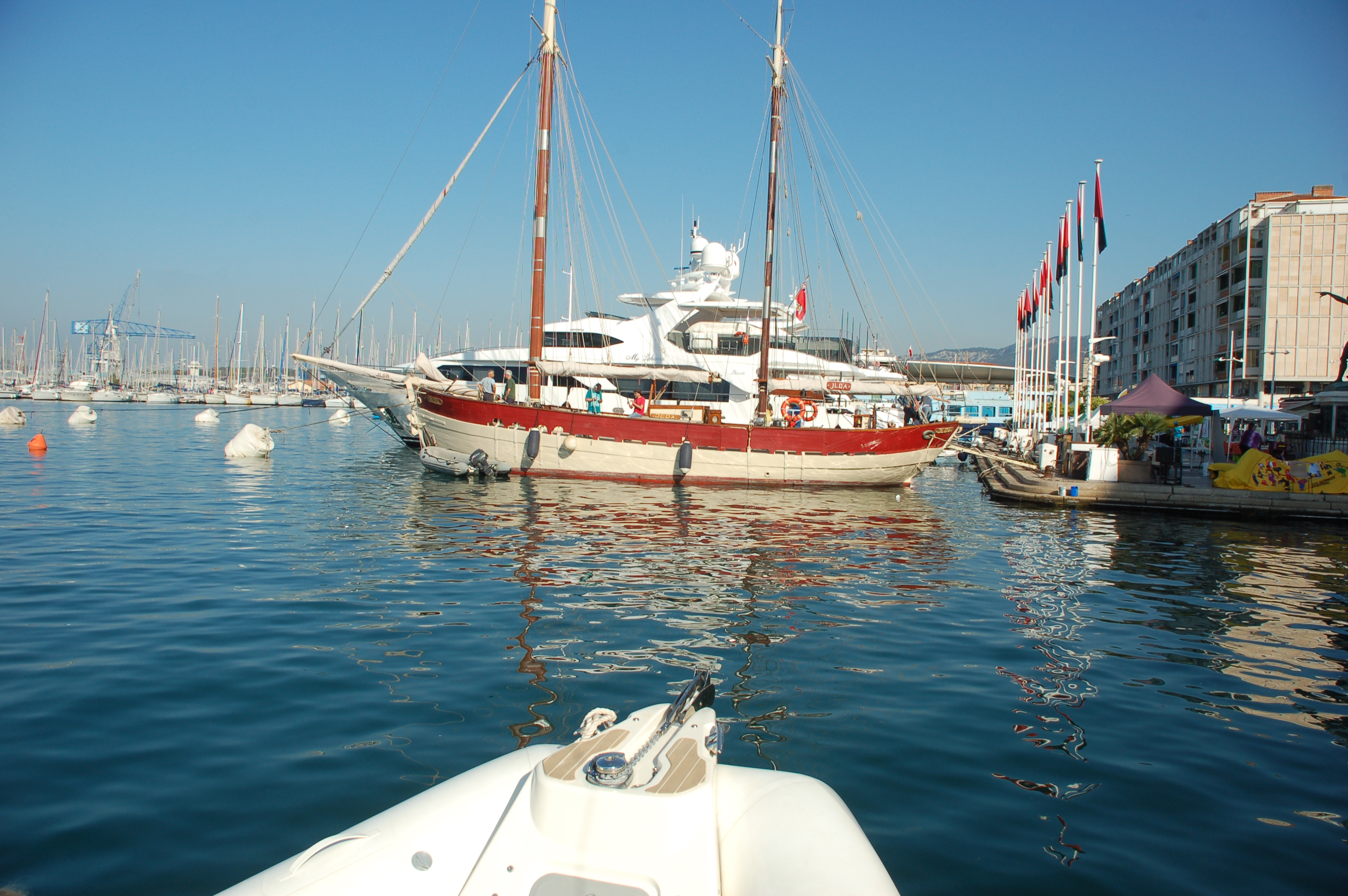 Le Jld'a dans son port d'attache : Toulon